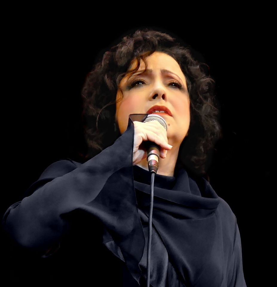 Mosca 20 Maggio 2015 - Moscow International House of Music Foto di scena (Antonella Ruggiero)